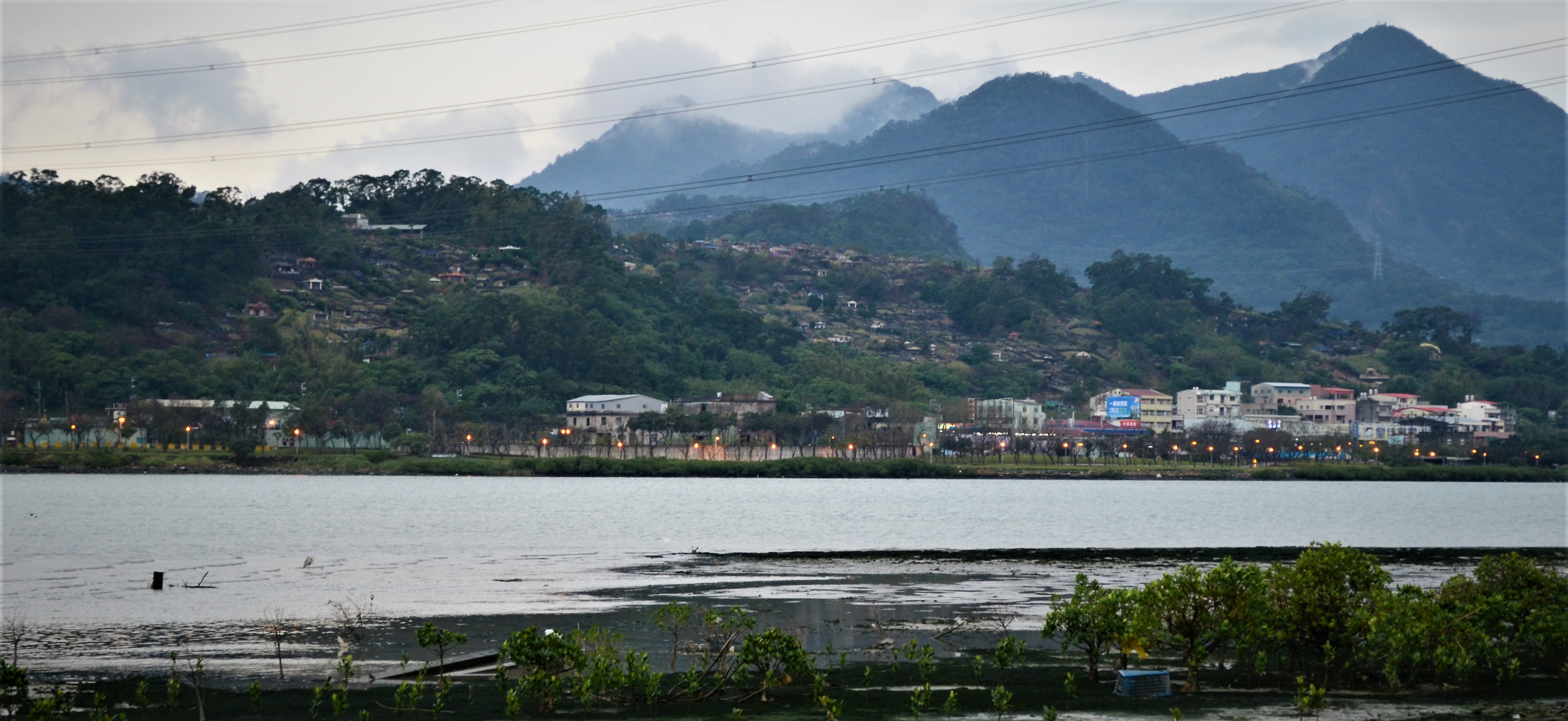 中文（台灣）